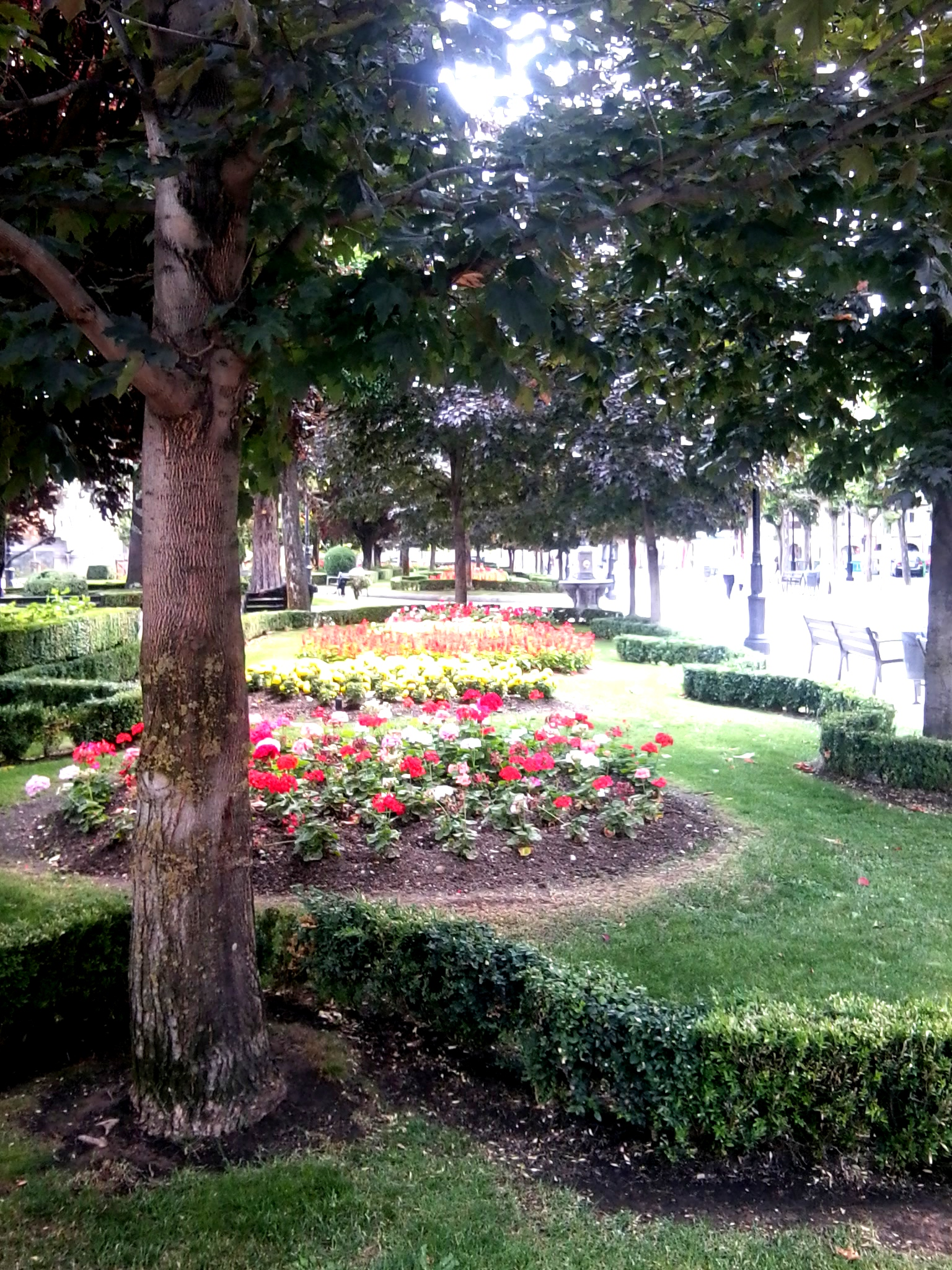 Jardines del espolón de logroño